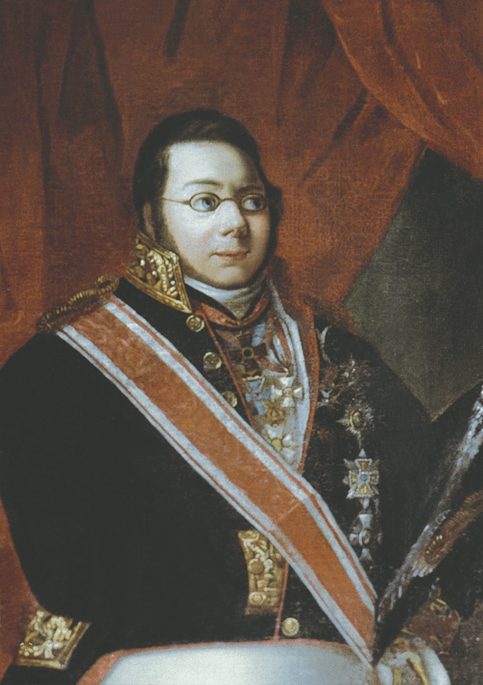 Pavel Nikolaevich Demidov founder of the Demidov prize П.П. Веденецкий. Портрет Павла Николаевича Демидова. Холст, масло. 1841 г. Нижнетагильский музей-заповедник